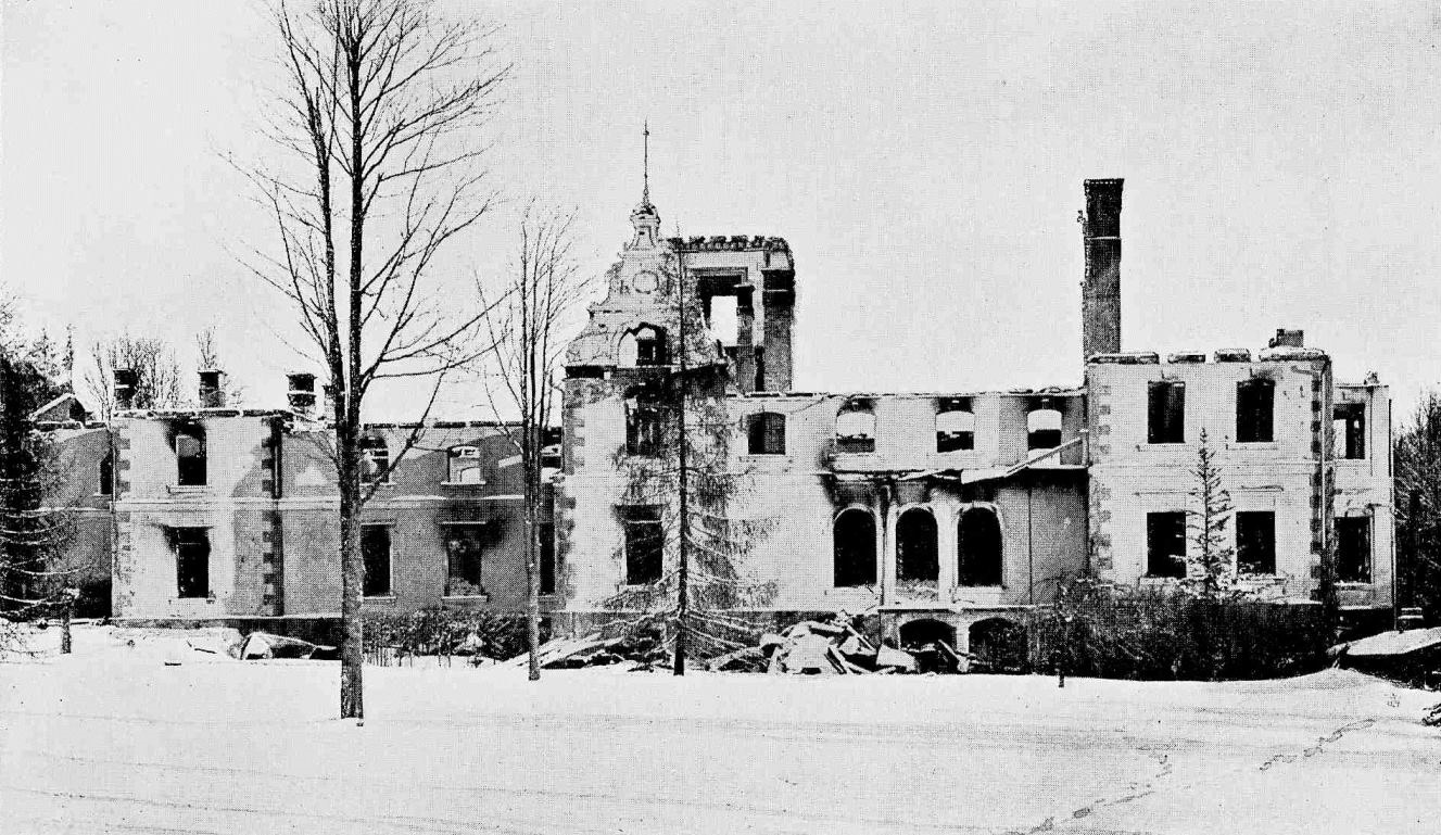 Stāmeriena mõisa peahoone tagakülg pärast 1905. aasta põlengut.